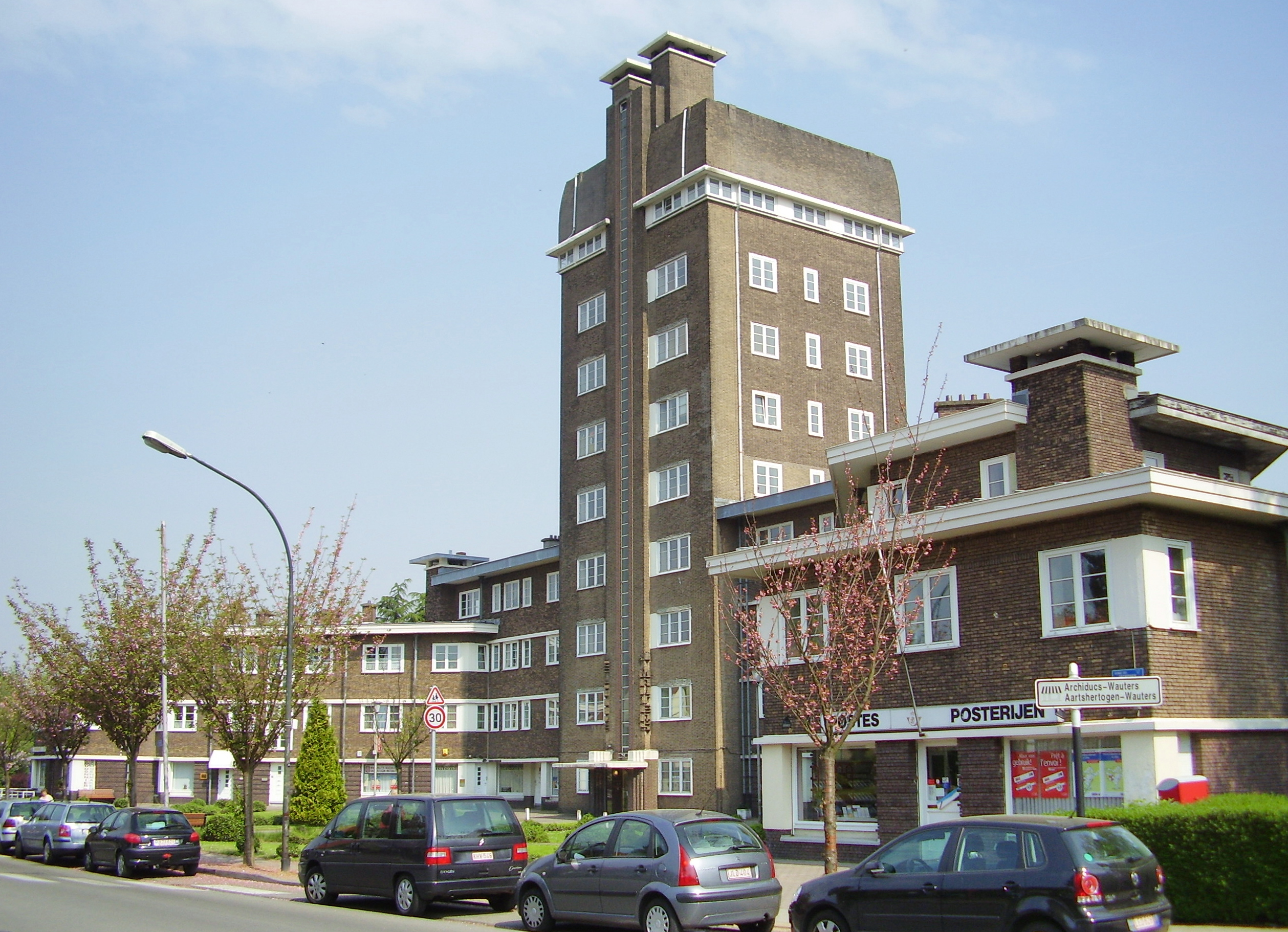 Cité-jardin Le Logis, Watermael-Boitsfort (Bruxelles) - Le Fer à cheval